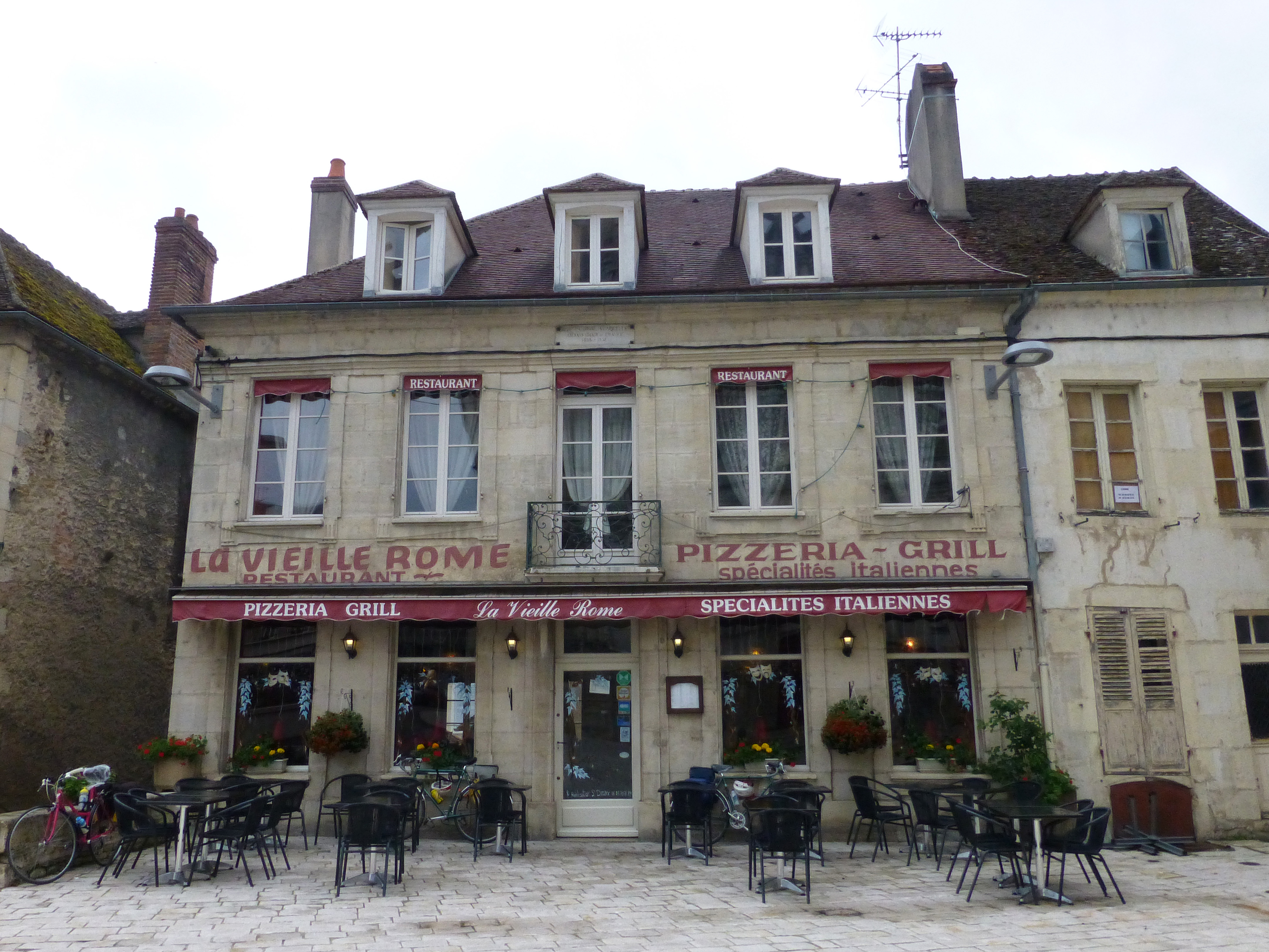 Maison natale de Gabriel Alapetite à Clamecy (Nièvre)